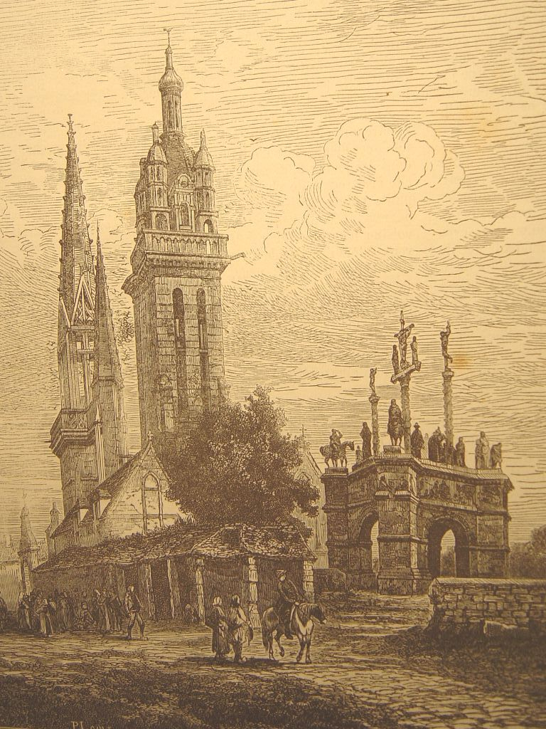 l'église et le calvaire de Pleyben (Bretagne) par Guiaud